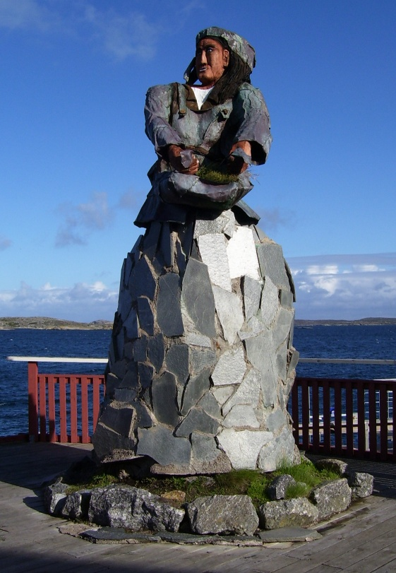 The statue Käringen at Käringön outside Orust, Sweden